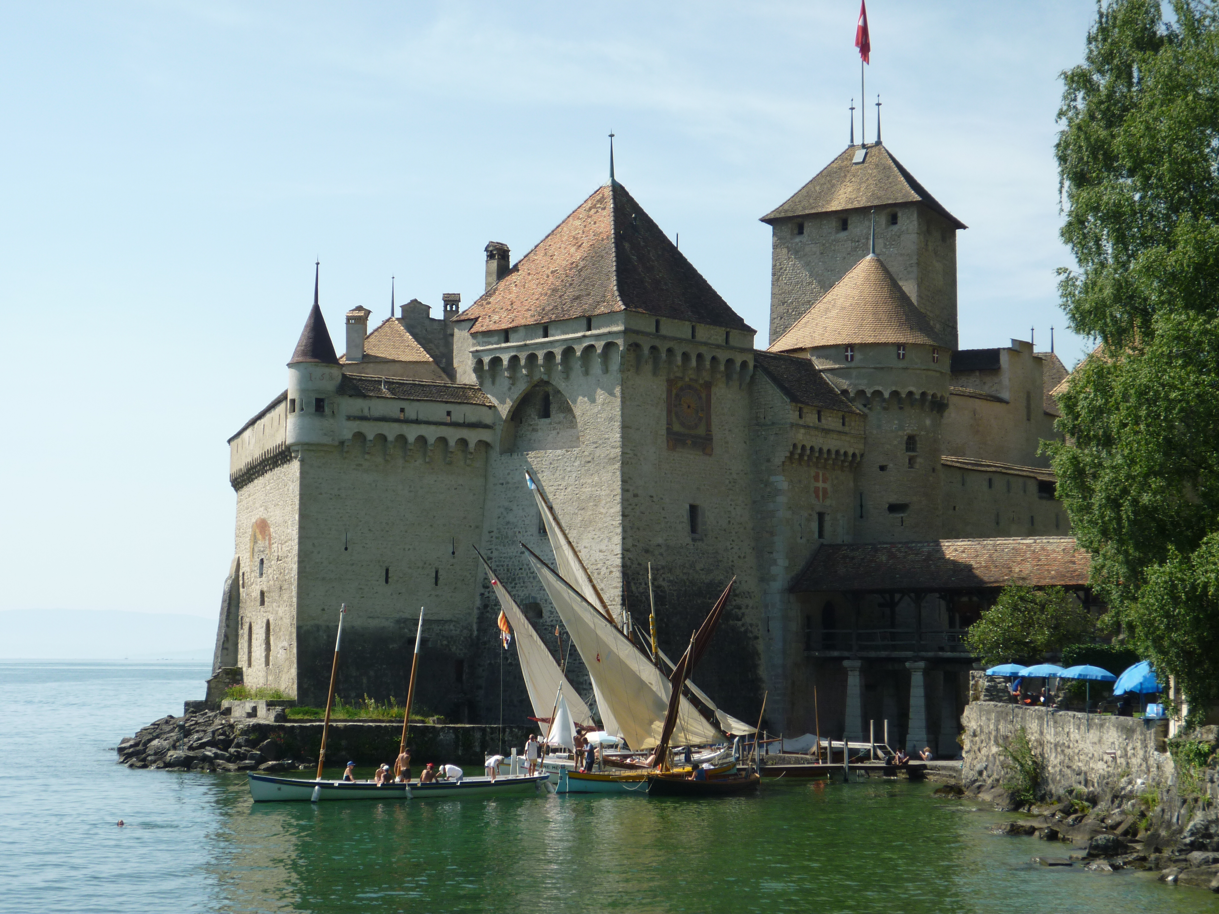 La flottille méditerranéenne de la CaraMed devant le château de Chillon